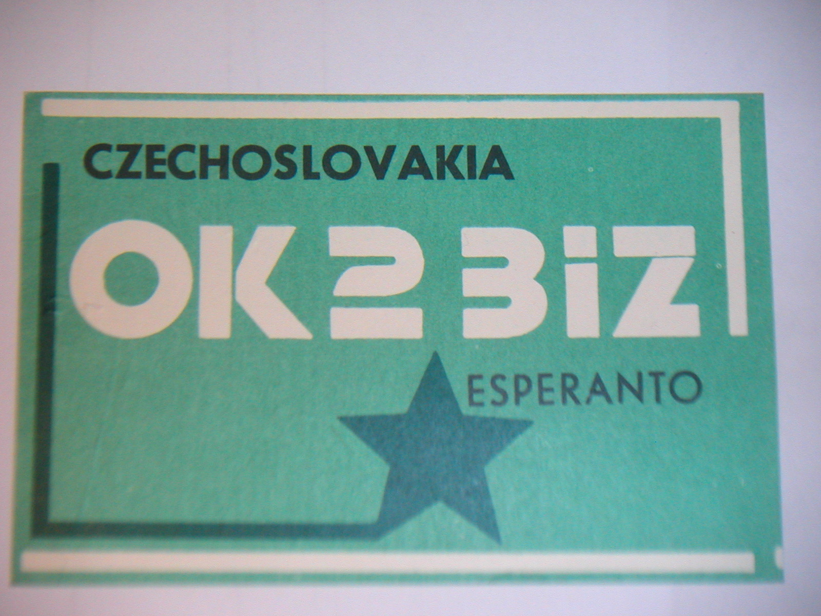 konfirmkarto (QSL) de radiostacio OK2BIZ